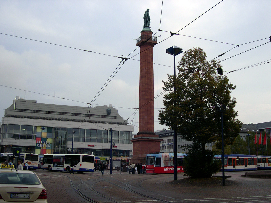 das Zentrum von Darmstadt